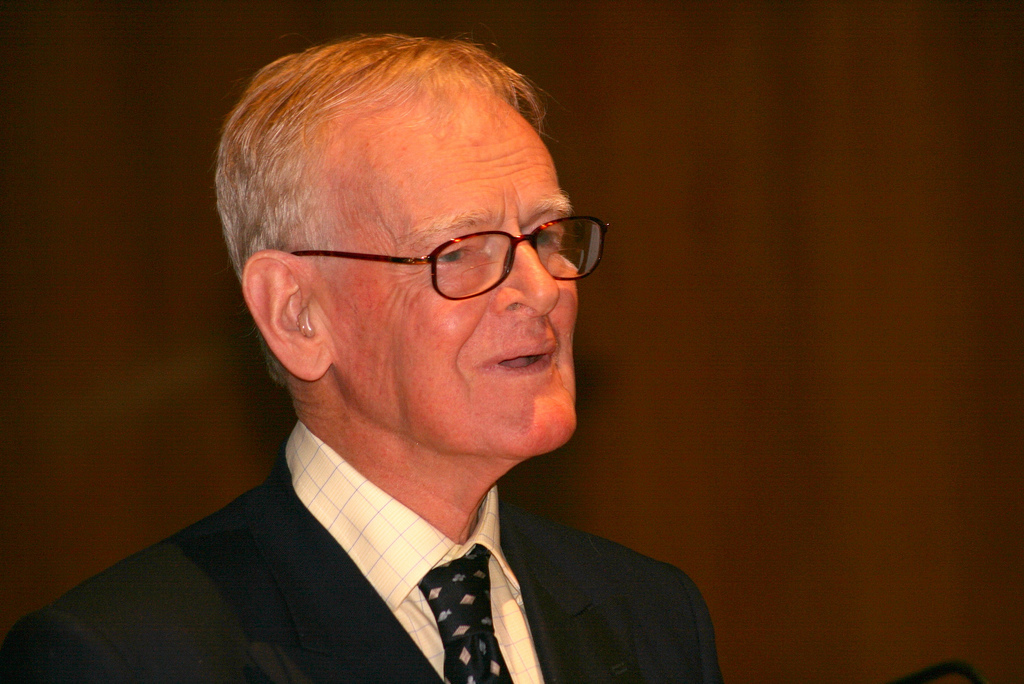 Stuart Wheeler